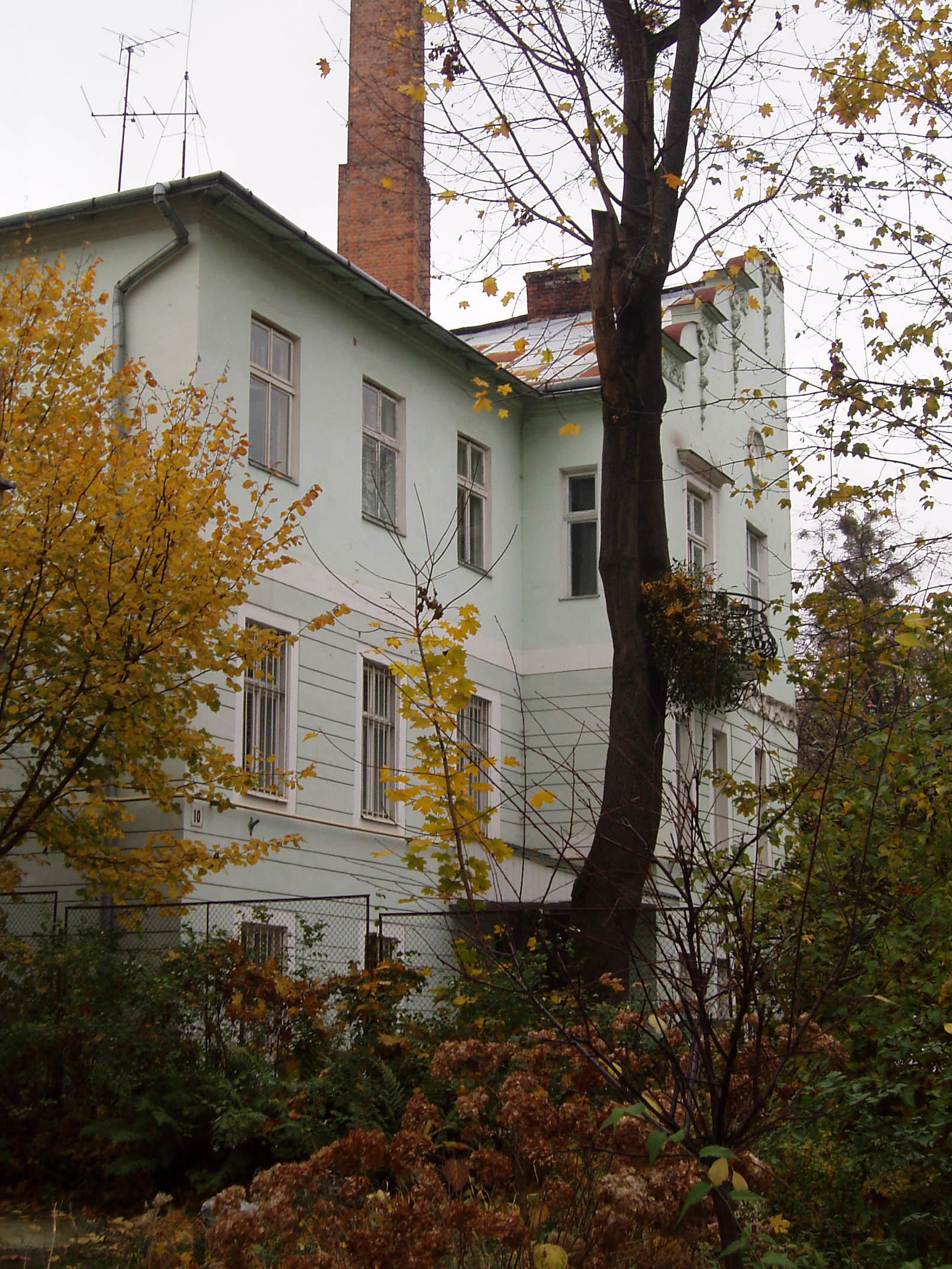 Будинок № 10 на вулиці Горбачевського у Львові